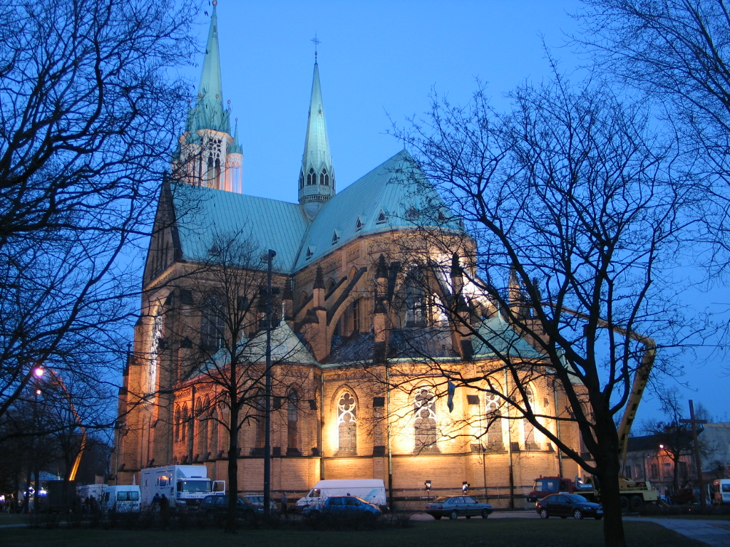 Archikatedra św. Stanisława Kostki w Łodzi